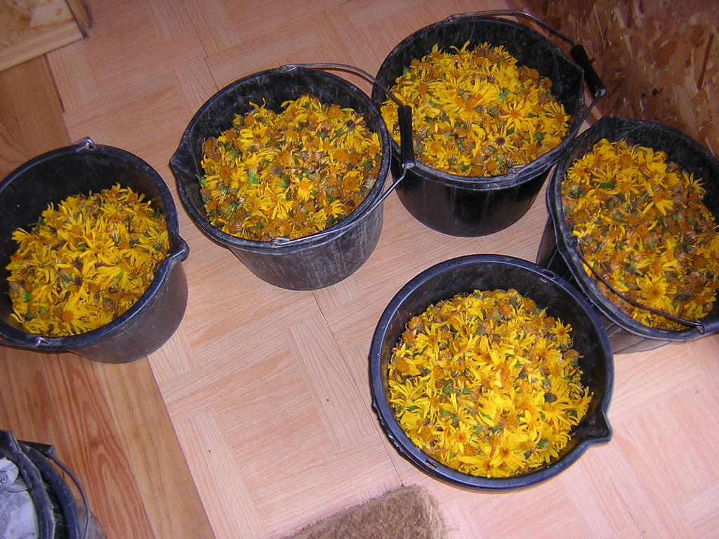 (en) Arnica montana field in Scotland (july 2004) (fr) exemple de culture de Arnica montana en Écosse (juillet 2004). Cette culture est située en Écosse, au nord d'Inverness à environ 150 m d'altitude. Cette culture d'Arnica montana fonctionne sous la forme d'une rotation culturale où pendant quatre années se récoltent quelques dizaines de kilogrammes de capitules secs sur chaque parcelles de 1000m². Cinq parcelles de cette taille ont ainsi un développement échelonné afin de permettre une production de plante entière annuelle d'environ 800 kg frais. Les plants sont cultivés sur des buttées de terre, recouvertes d'une bâche afin de limiter les adventices, avec un espacement d'environ 40 cm. Les plants de culture sont élancés et fins contrairement aux plants sauvages souvent trapus. Les capitules sont récoltés puis séchés, en laissant quelques fleurs pour la récolte des graines. Ces capitules récoltés sont destinés aux laboratoires pharmaceutiques, principalement Weleda.